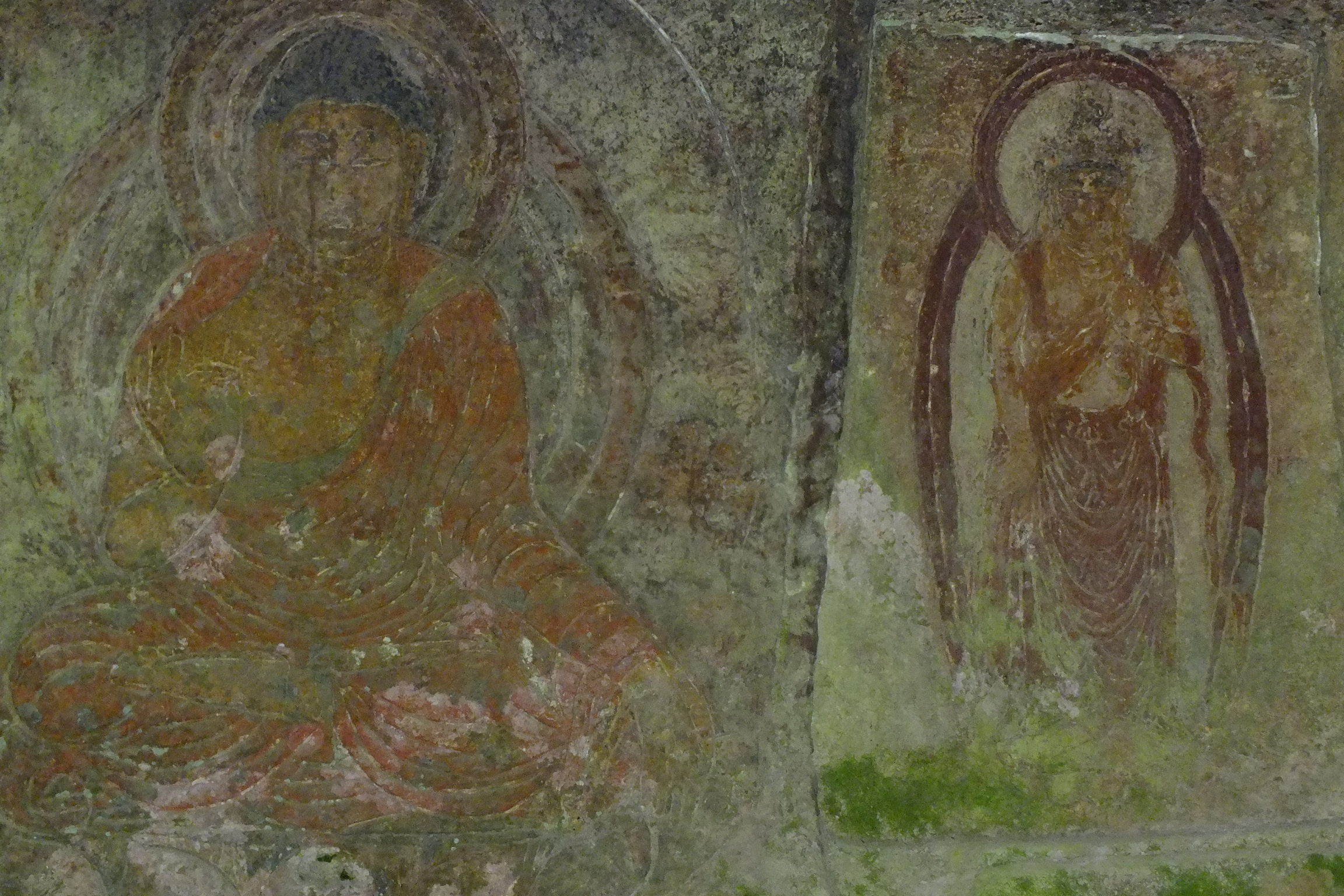 2017-04-22 Jigokudani Sekkutsubutu 地獄谷石窟仏 柳生街道